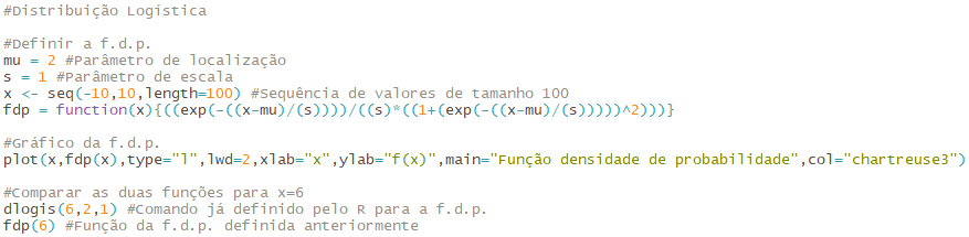 Script da f.d.p.